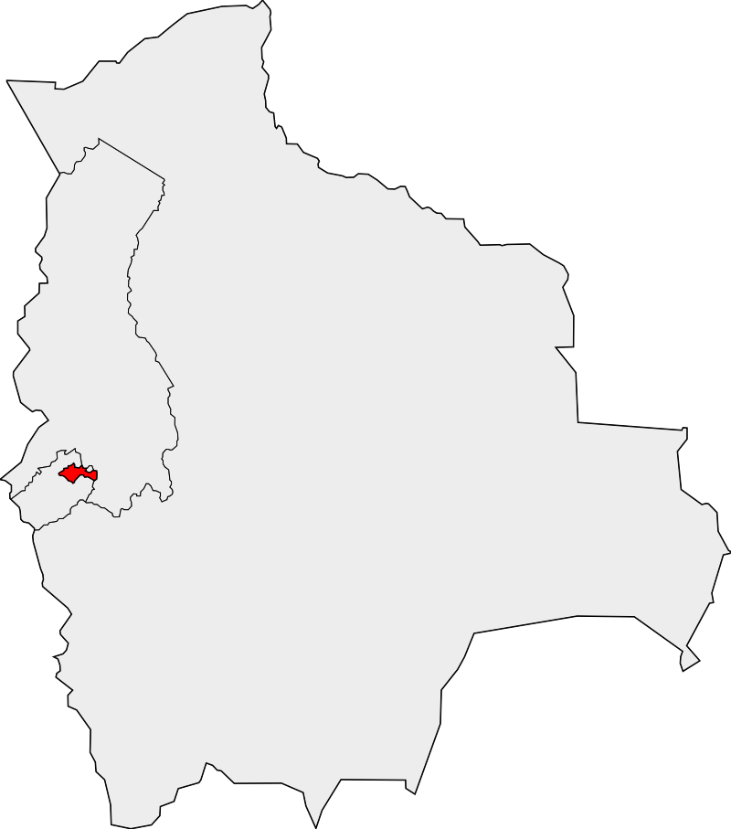 Ubicación del municipio de Coro Coro en la provincia de Pacajes, departamento de La Paz, Bolivia. Trabajo propio. Vectorización basada en